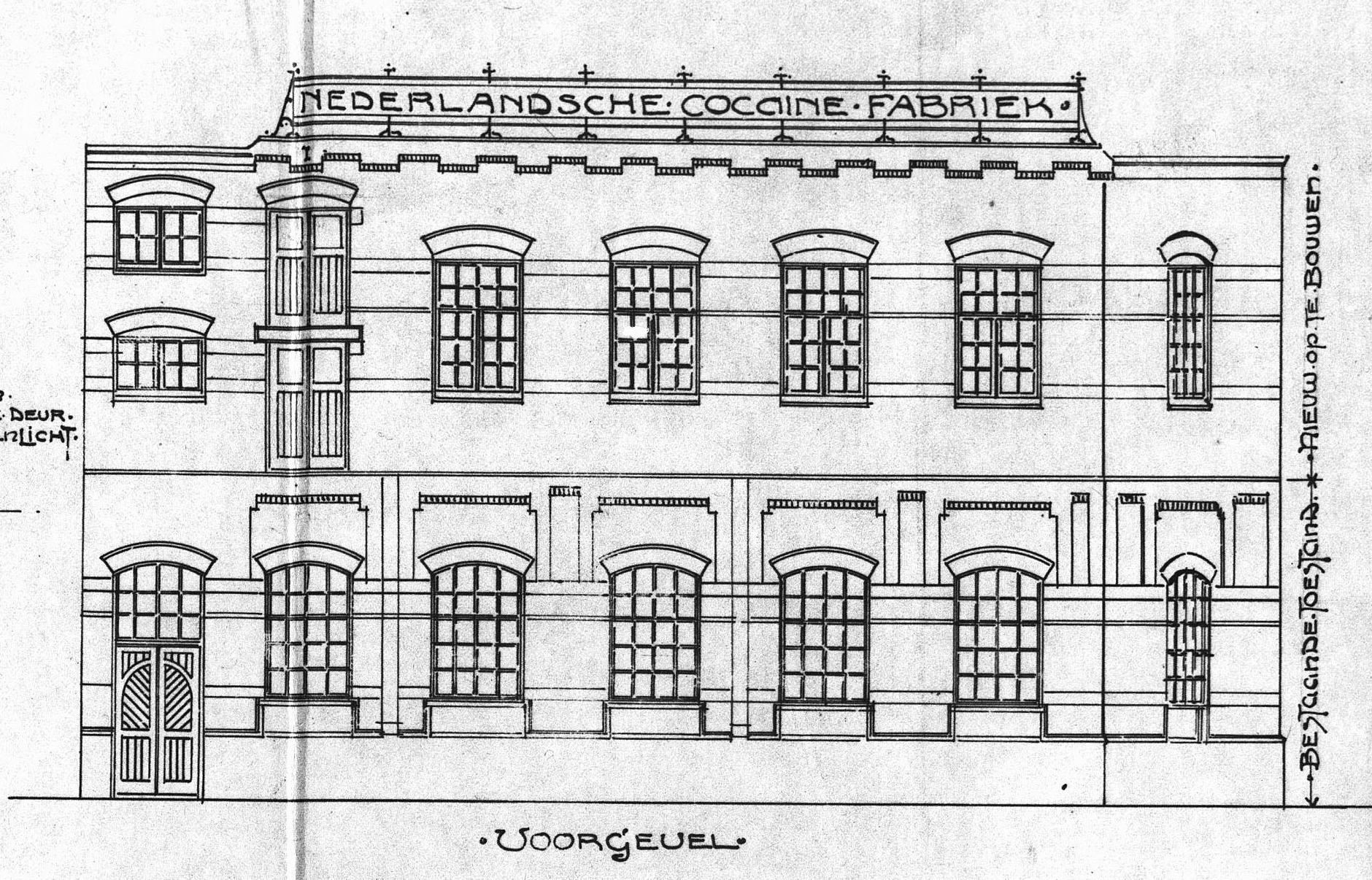 Nederlandsche Cocaïnefabriek (NCF) te Amsterdam. Uitbreidingsplan voor de fabriek van architect Hermanus Hendrikus Baanders uit 1902 voor de lokatie Eerste Schinkelstraat 30. In 1910 was het uitgegroeid tot een van de grootste cocaïnefabrieken ter wereld en ter verdere uitbreiding werd aan de Duivendrechtsekade in Amsterdam een nieuwe productielocatie gevonden.